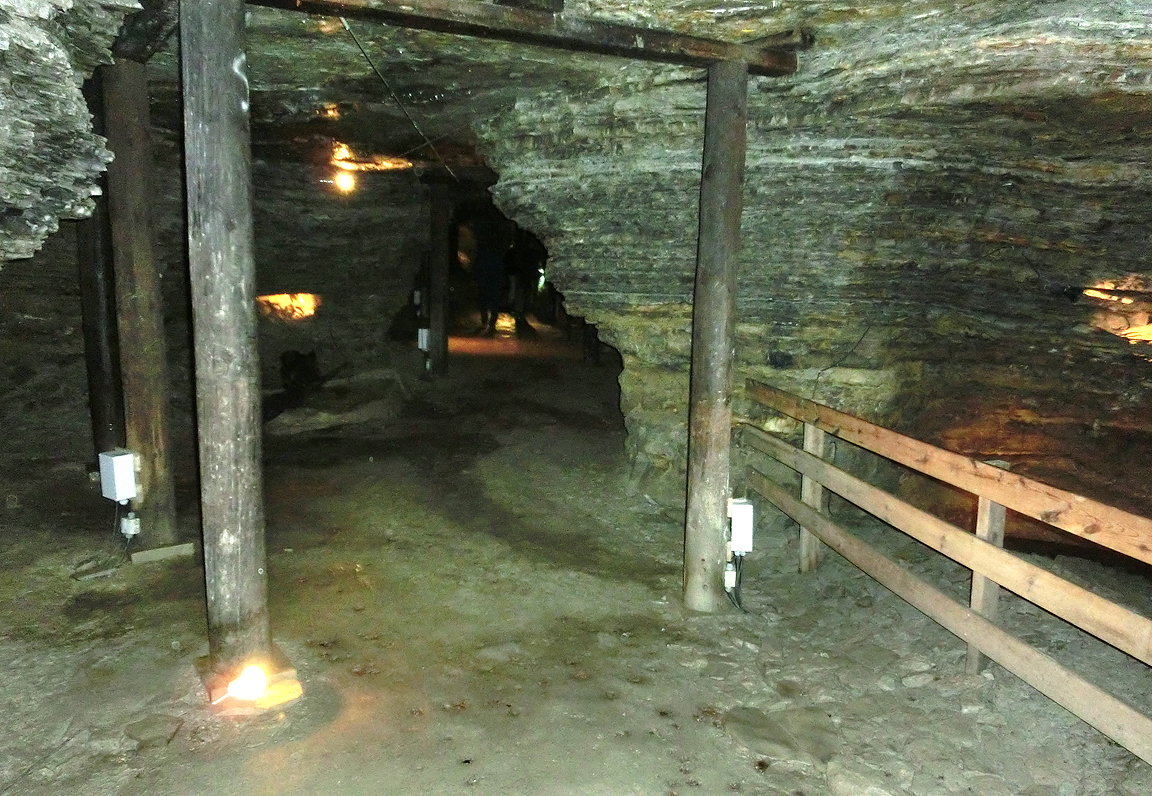 Nere i Qvarnstensgruvan Minnesfjället (RAÄ-nummer Lugnås 1:1) i nordöstra kanten av Lugnåsberget, Lugnås socken, Mariestads kommun, f.d. Skaraborgs län, Västergötland, Västra Götalands län, Sverige.